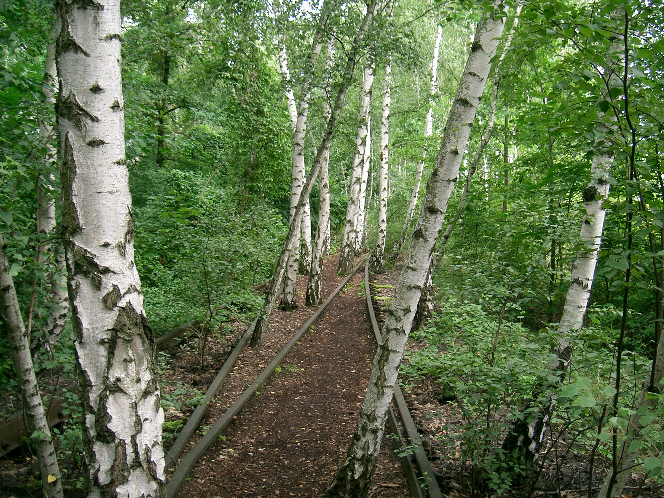 Natur-Park Südgelände auf dem Gebiet des ehemaligen Bahnhofes Berlin-Tempelhof Rbf (offizielles Motto „Bahnbrechende Natur“)